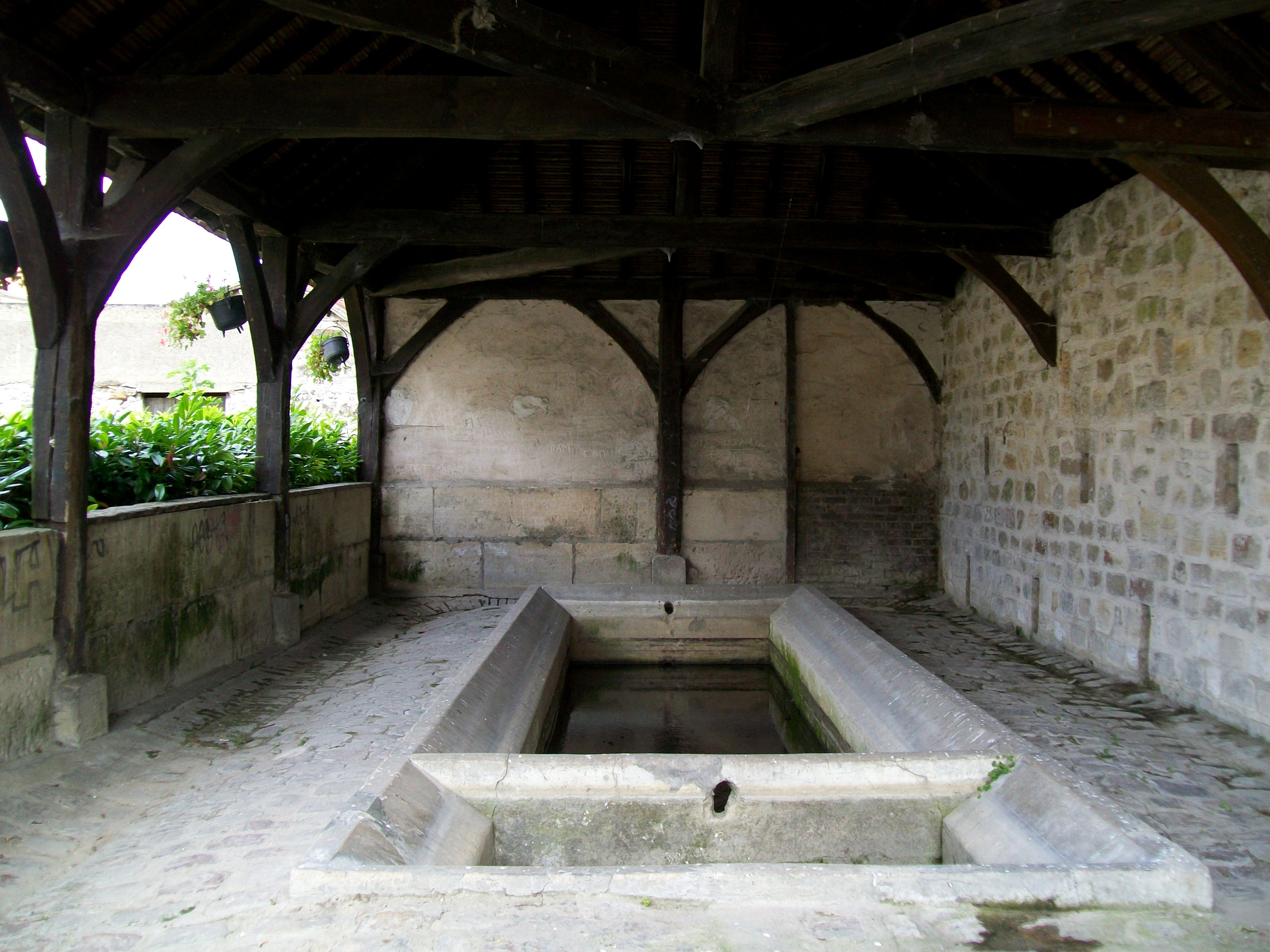 L'intérieur du lavoir rue des Auges, qui date de 1845.